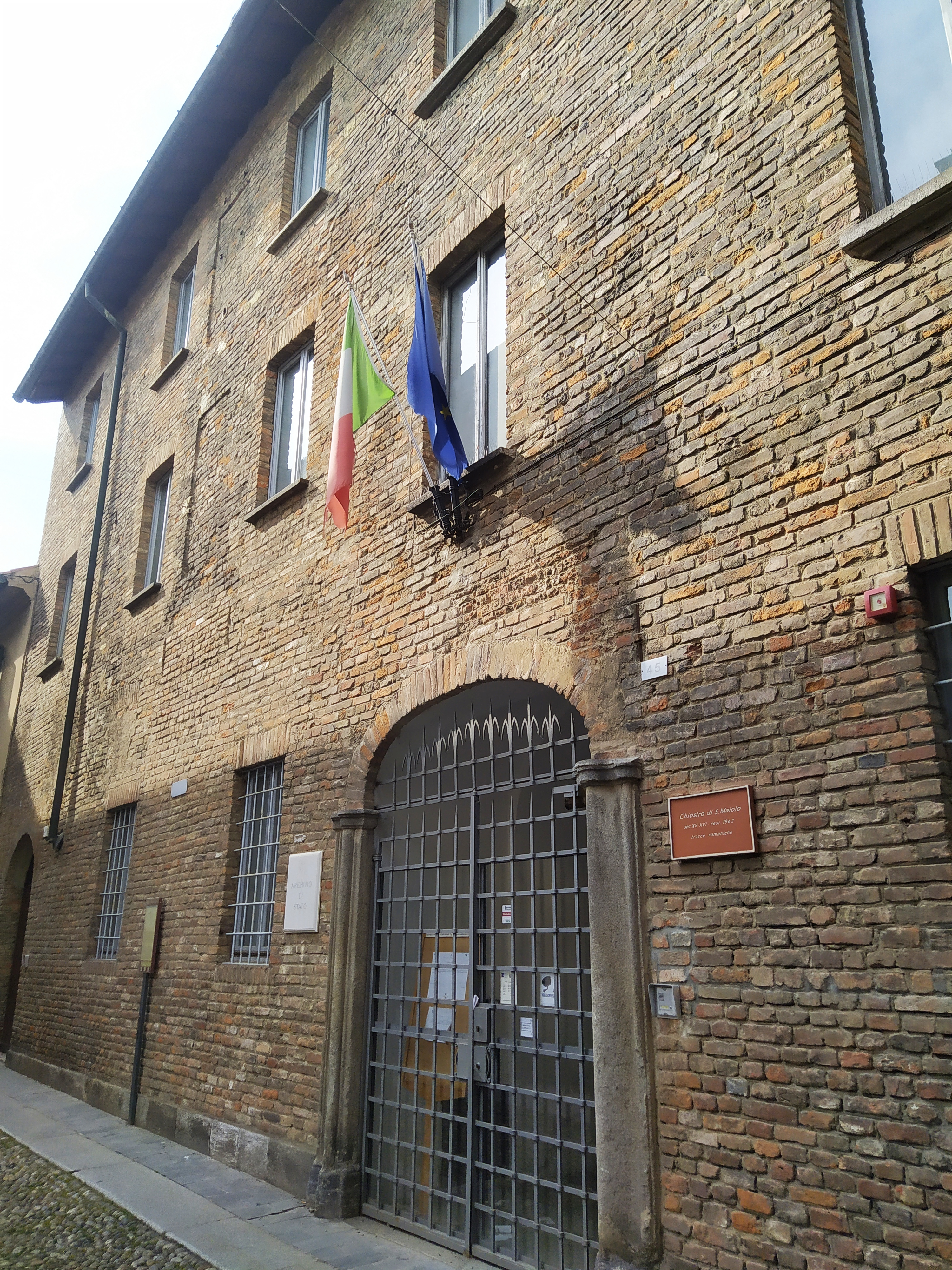 Facciata in Via Cardano (Pavia) dell'edificio ex Convento di San Maiolo che ospita l'Archivio di Stato di Pavia